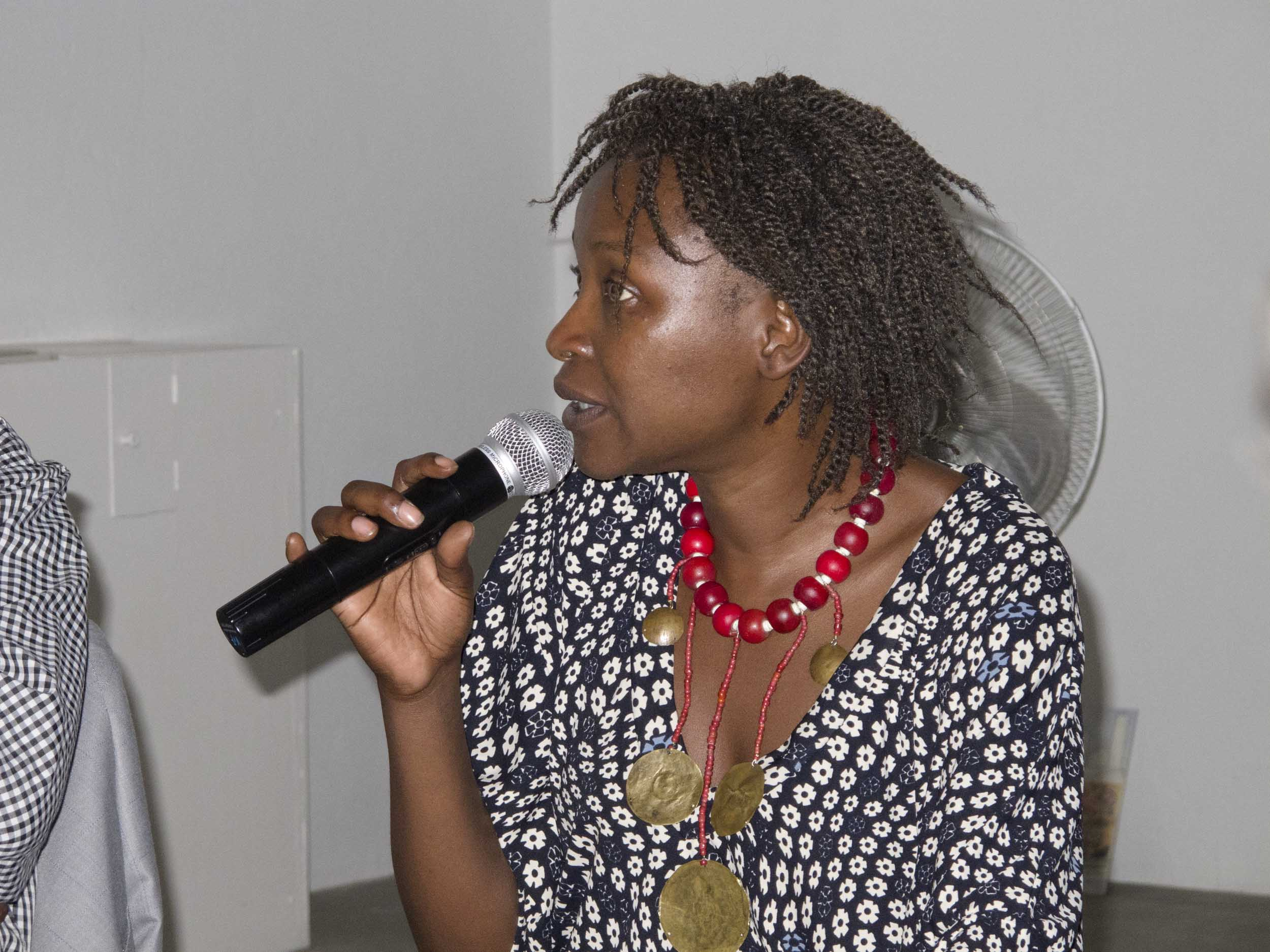 SUD-Salon Urbain de Douala - Conferentie